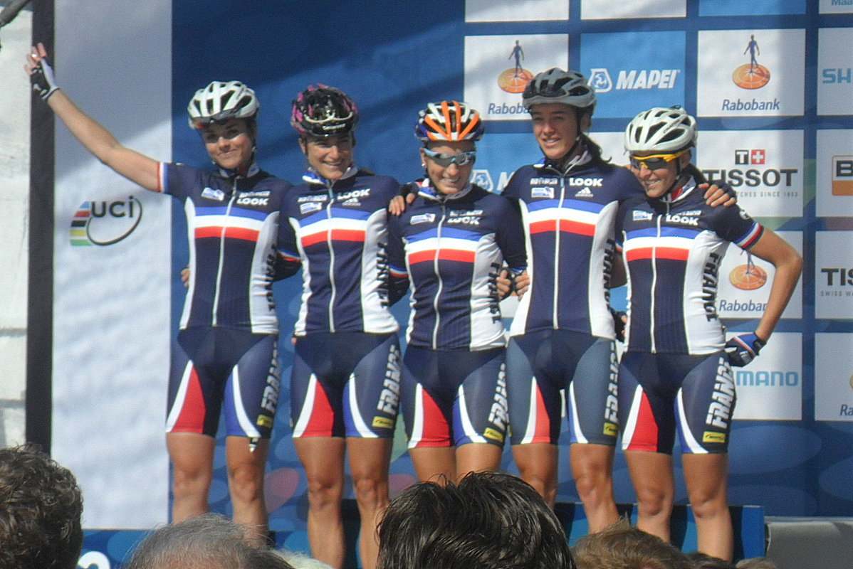 Ploegenpresentatie Frankrijk voor de start van het Wereldkampioenschap 2012 in Valkenburg, Nederland.